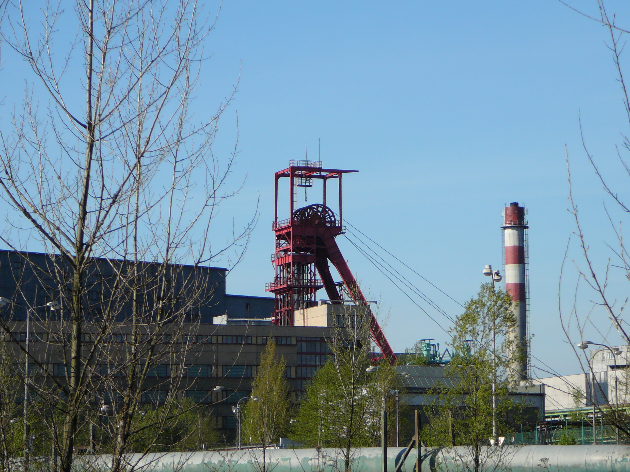 Klecová těžní věž dolu Darkov